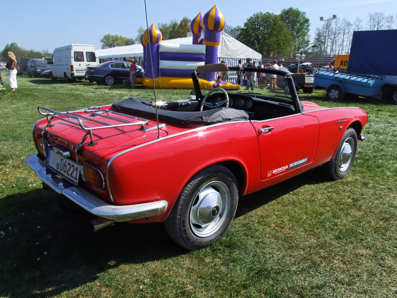 Honda S 800